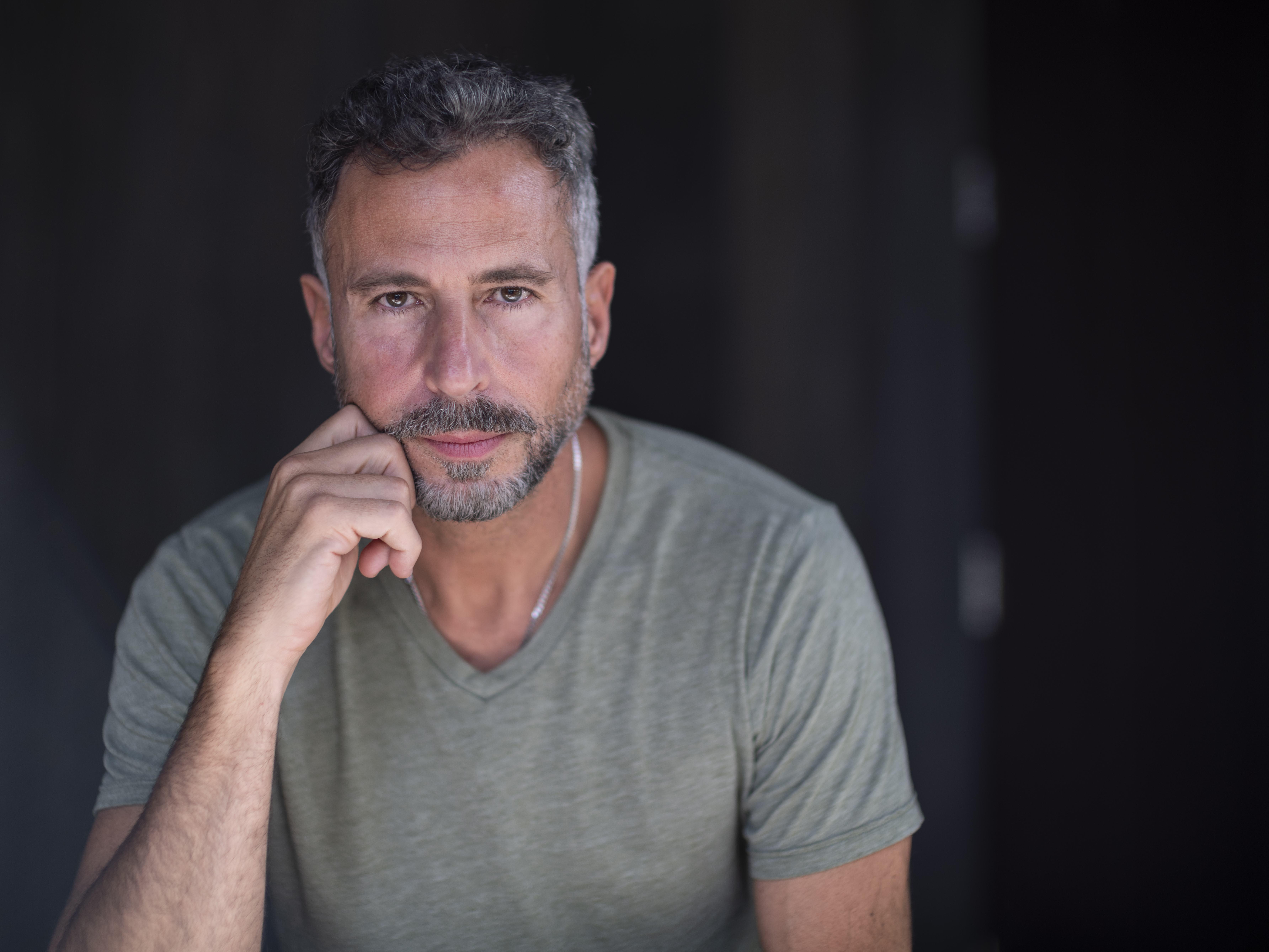 Enrique Martinez Celaya in 2020.